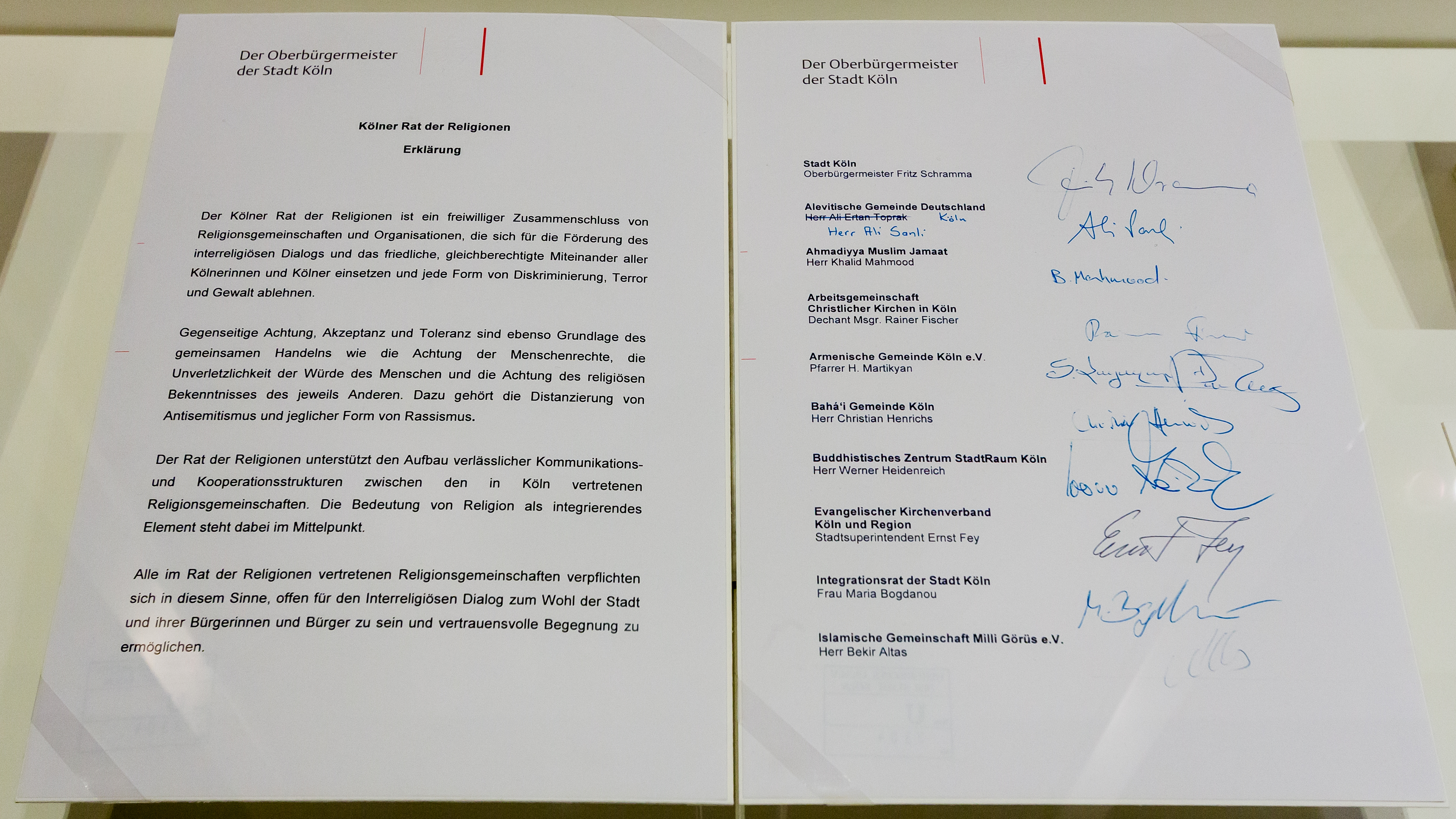 Ausstellungseröffnung „Hilliges Köln 2.0 – Auf dem Weg zur religiösen Toleranz“ Foto: Kölner Rat der Religionen - Erklärung. Unterzeichnet 2007 durch Stadt Köln - Oberbürgermeister Fritz Schramma Alevitische Gemeinde Deutschland - Ali Sanli Ahmadiyya Muslim Jamaat - Khalid Mahmood Arbeitsgemeinschaft Christlicher Kirchen in Köln - Dechant Msgr. Rainer Fischer Armenische Gemeinde Köln e.V. - Pfarrer H. Martikyan Bahá'i Gemeinde Köln - Christian Henrichs Buddhistisches Zentrum StadtRaum Köln - Werner Heidenreich Evangelischer Kirchenverband Köln und Region - Stadtsuperintendent Ernst Fey Integrationsrat der Stadt Köln - Maria Bogdanou Islamische Gemeischaft Milli Görüs e.V. - Bekir Altas Historisches Archiv der Stadt Köln, Bestand 7550 U 3304